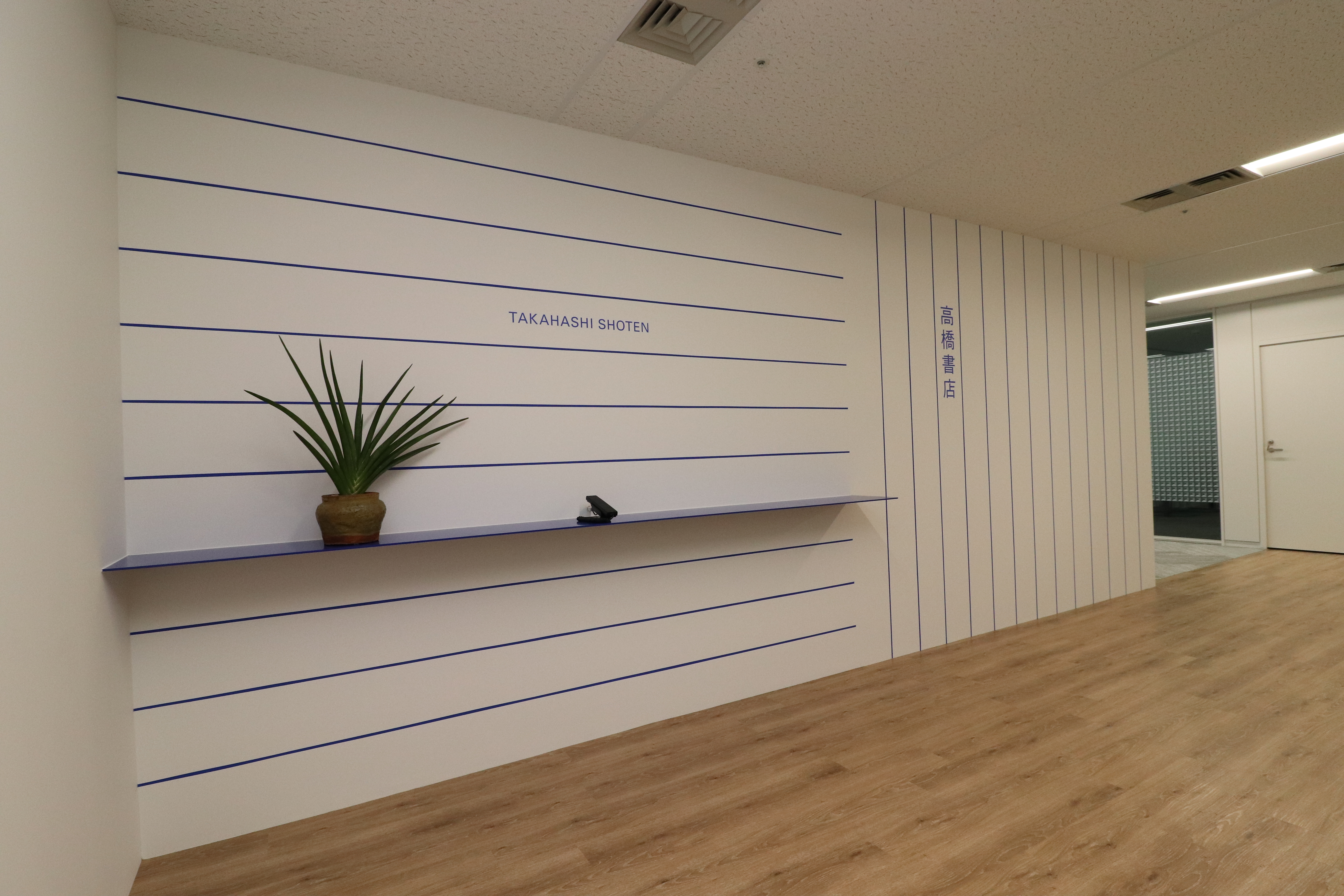 Ido: 高橋書店本社の入り口です。